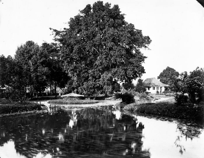 Foto. Album beslaat souvenir foto's van Java. Het huis van de resident in Tjiandjoer in Preanger